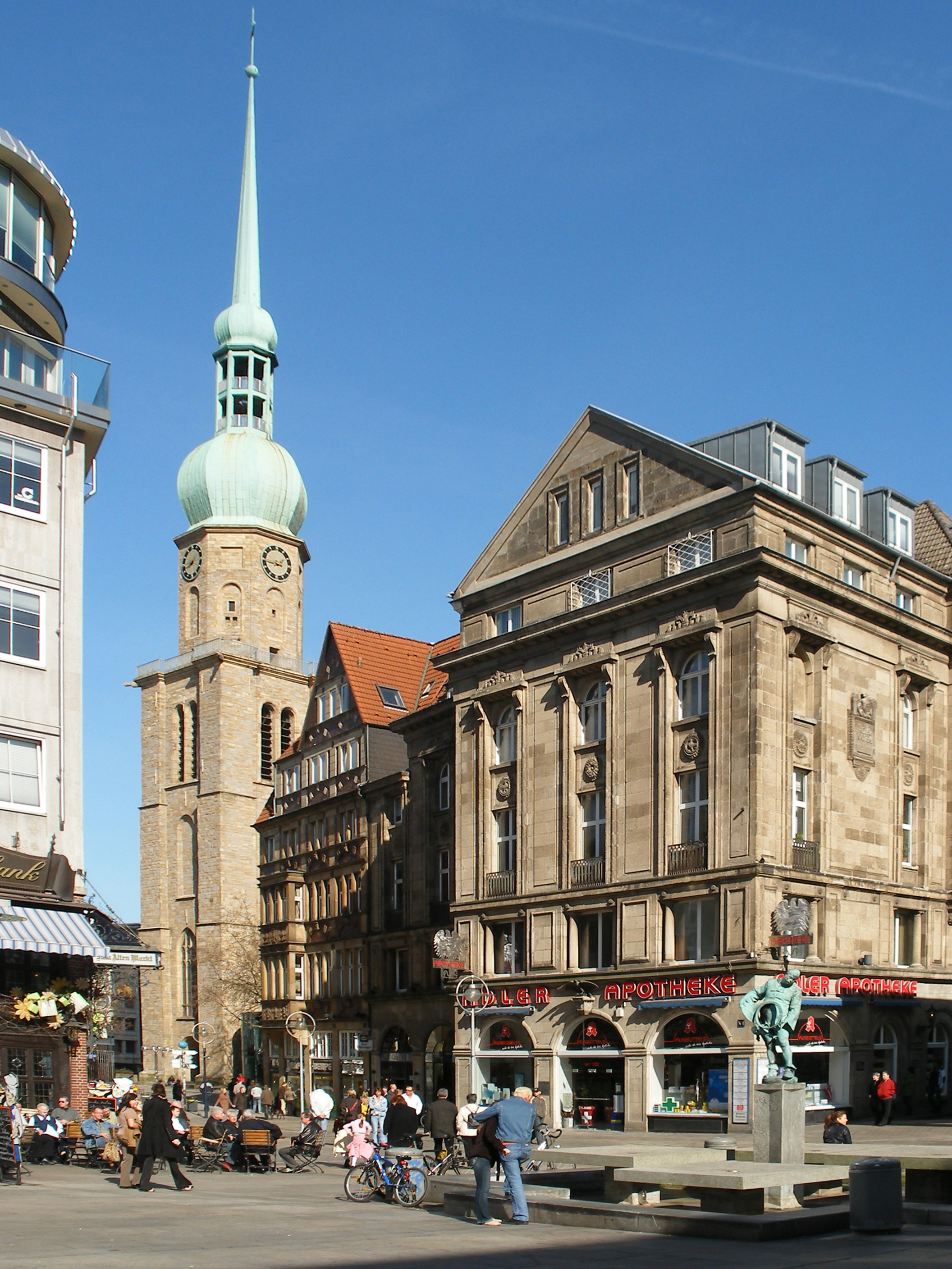 Alter Markt Dortmund. Mit Blick auf die Reinoldikirche und die Adler Apotheke